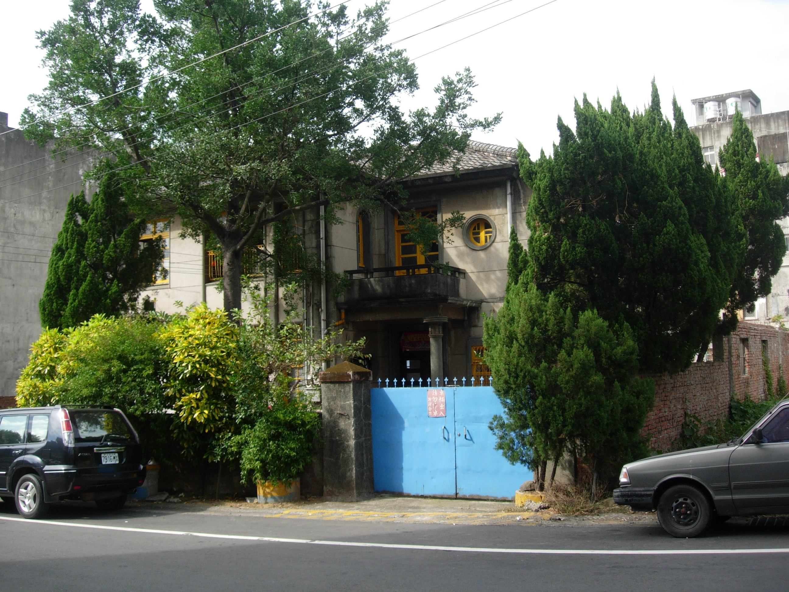 中文（台灣）: 關西特色建築